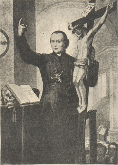 Gaspard del Bufalo, fondateur des missionnaires du Précieux Sang